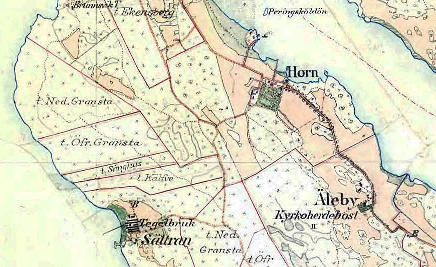 Horn och Sättra tegelbruk på Häradsekonomiska kartan